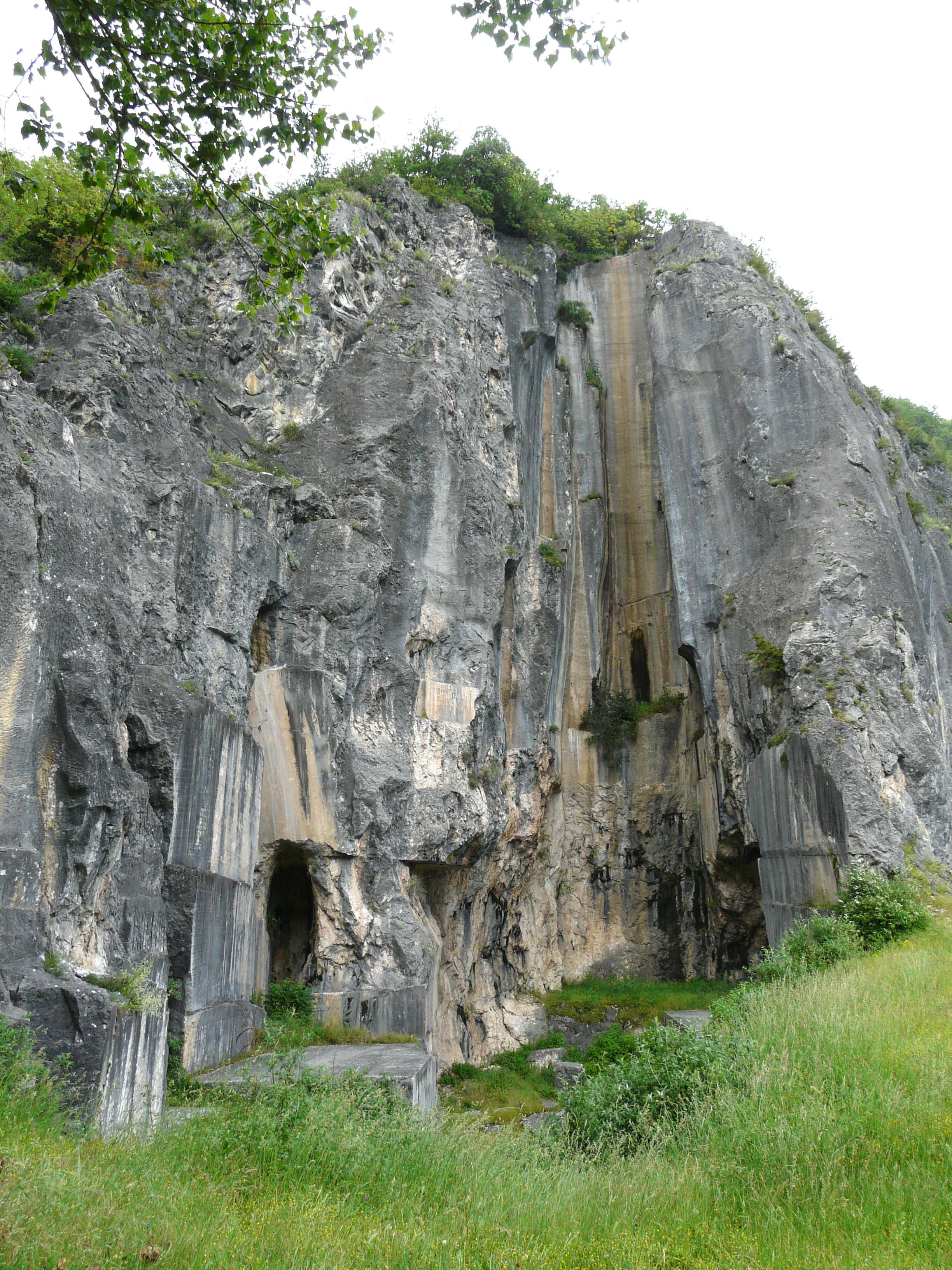 La brèche romaine, ancienne carrière de marbre située sur les communes de Saint-Béat et Lez, Haute-Garonne, France.